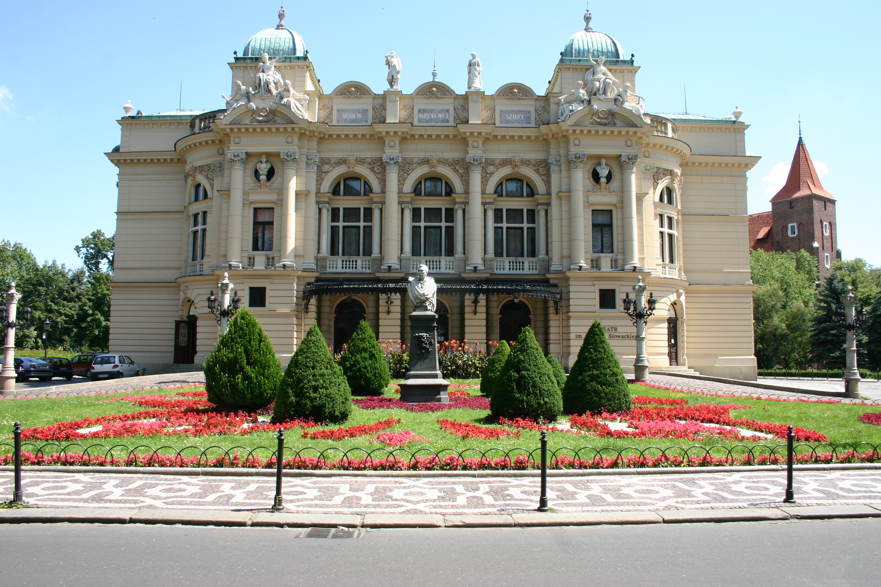 Kraków, Poland